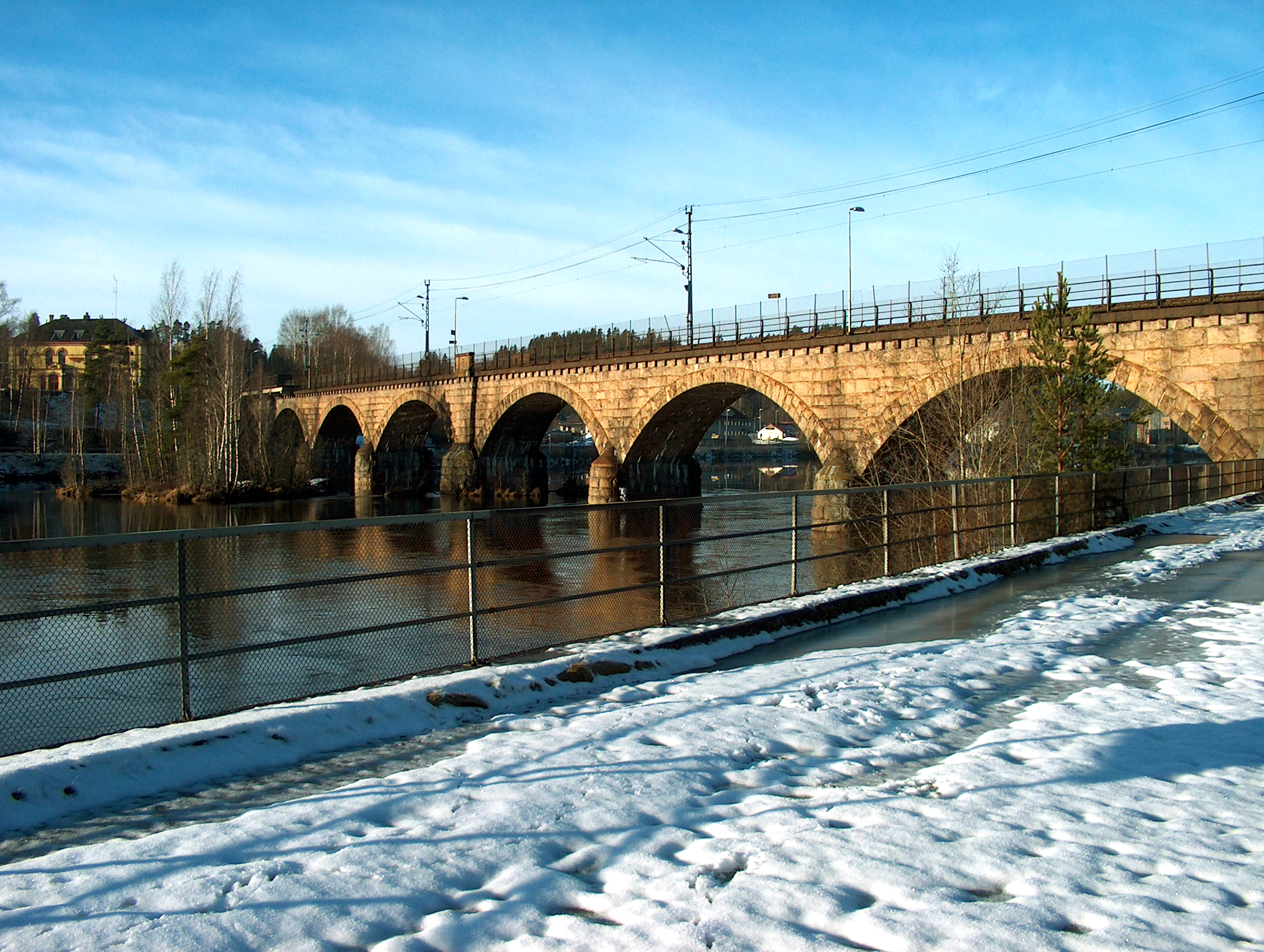 Begna bru (Begna Bridge), jernbanebrua over Ådalselva (a railway bridge past River Begna)